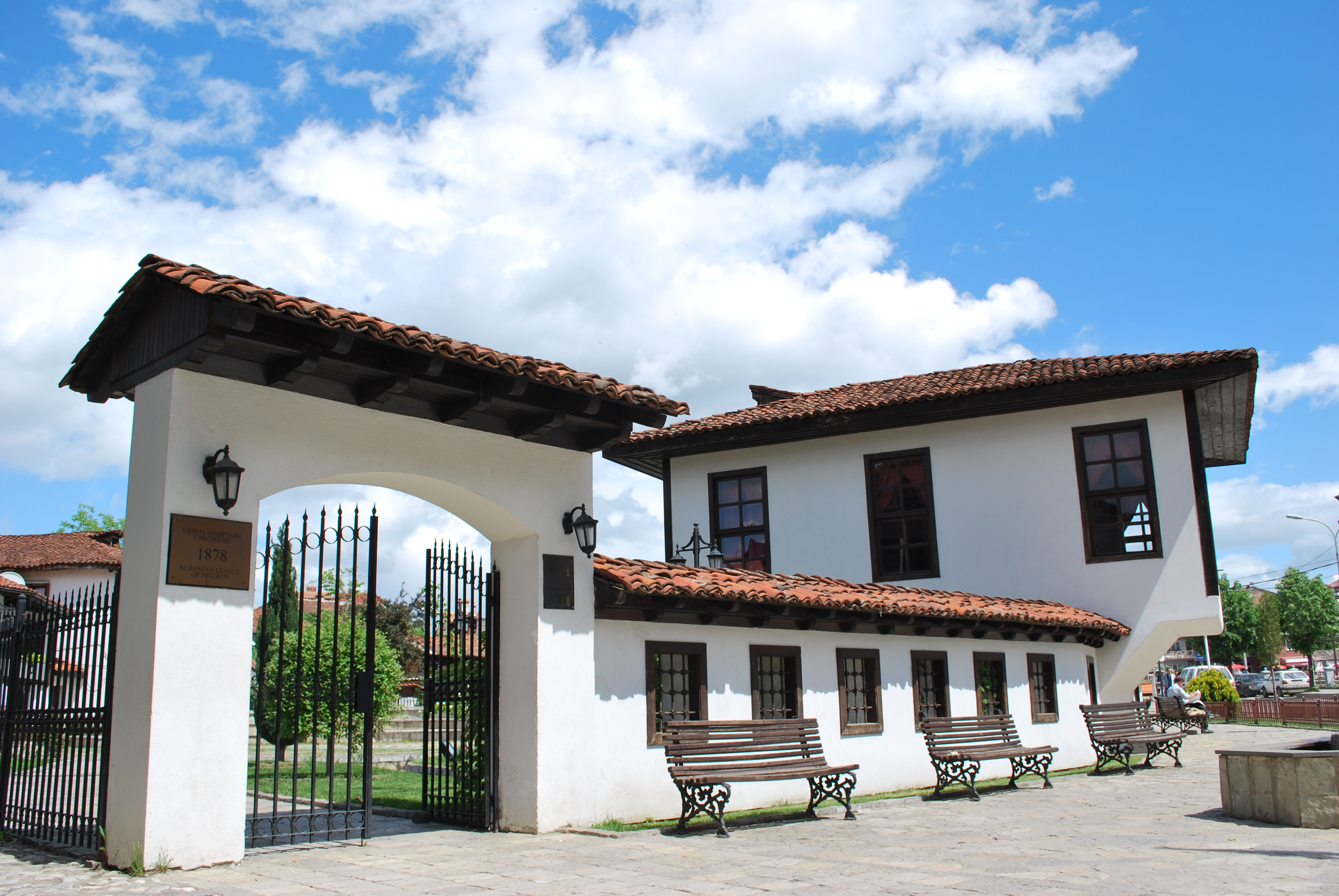 Dům Prizrenské ligy v Prizrenu